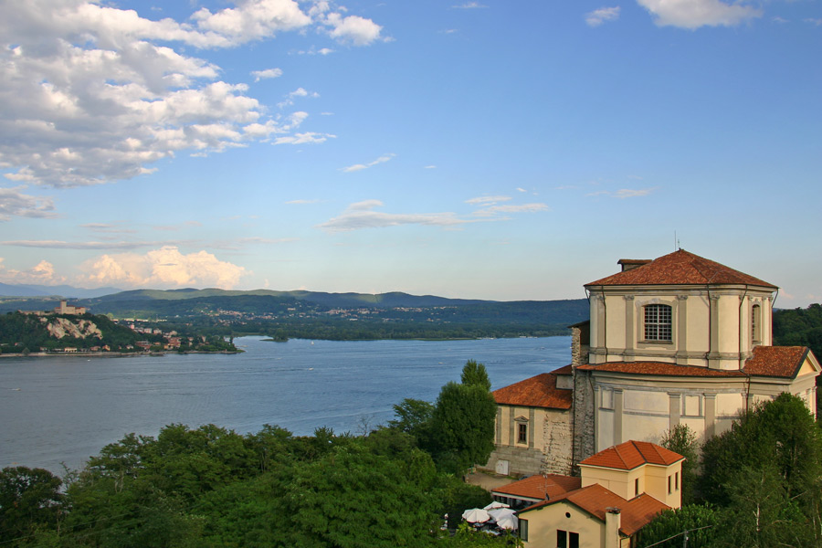 Vista dal Colosso di San Carlo Borromeo presso il sacro Monte di Arona (NO). In primo piano la chiesa di San Carlo. Sullo sfondo la rocca di Angera.